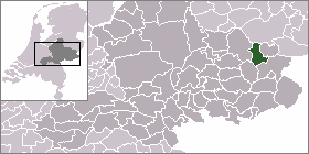 Locatie voormalige gemeente Borculo. Afbeelding gemaakt door gebruiker:Mtcv en vrij te gebruiken.